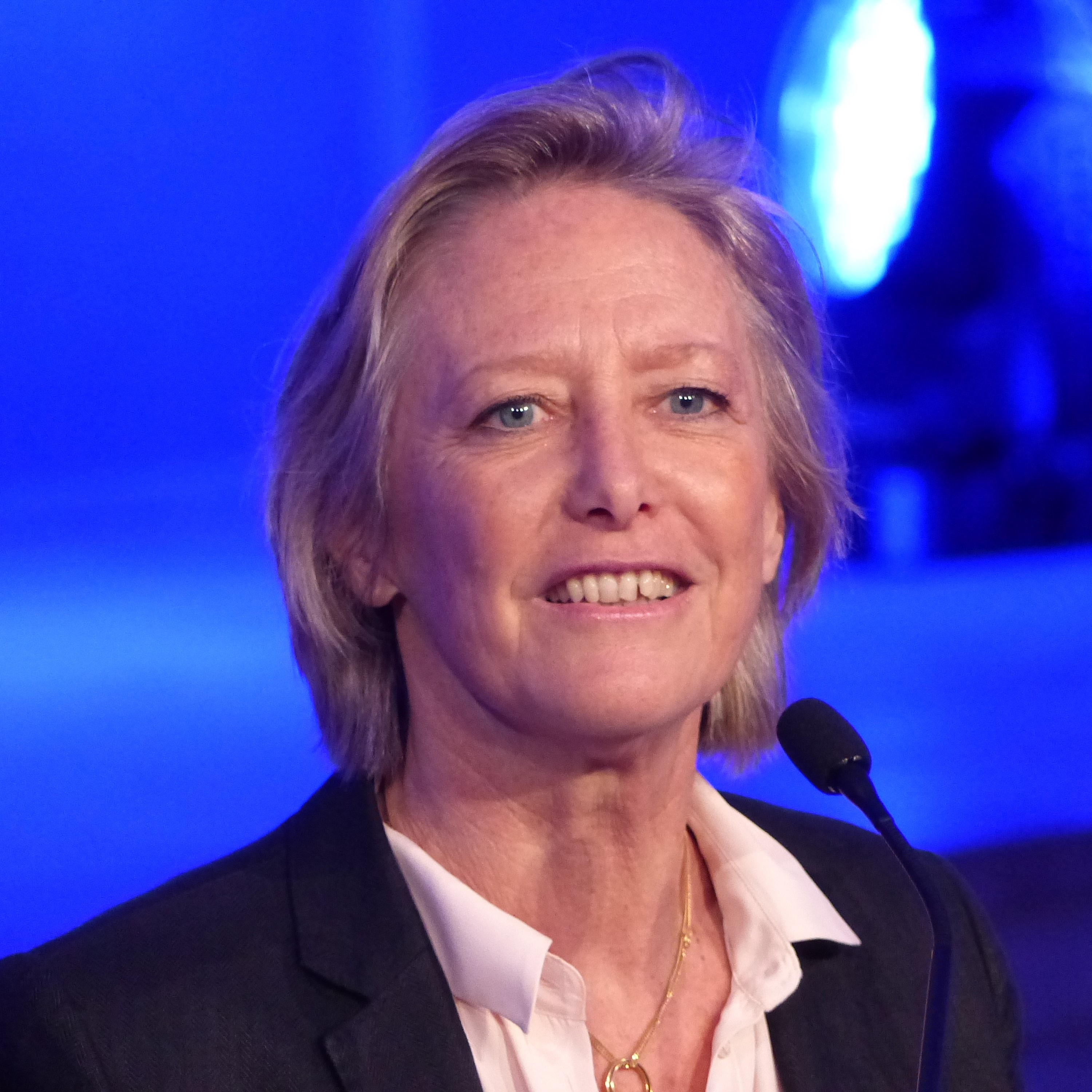 Sophie Cluzel, secrétaire d'Etat aux personnes handicapées, lors du lancement du 4e plan autisme (ou stratégie autisme) le 6 avril 2018.